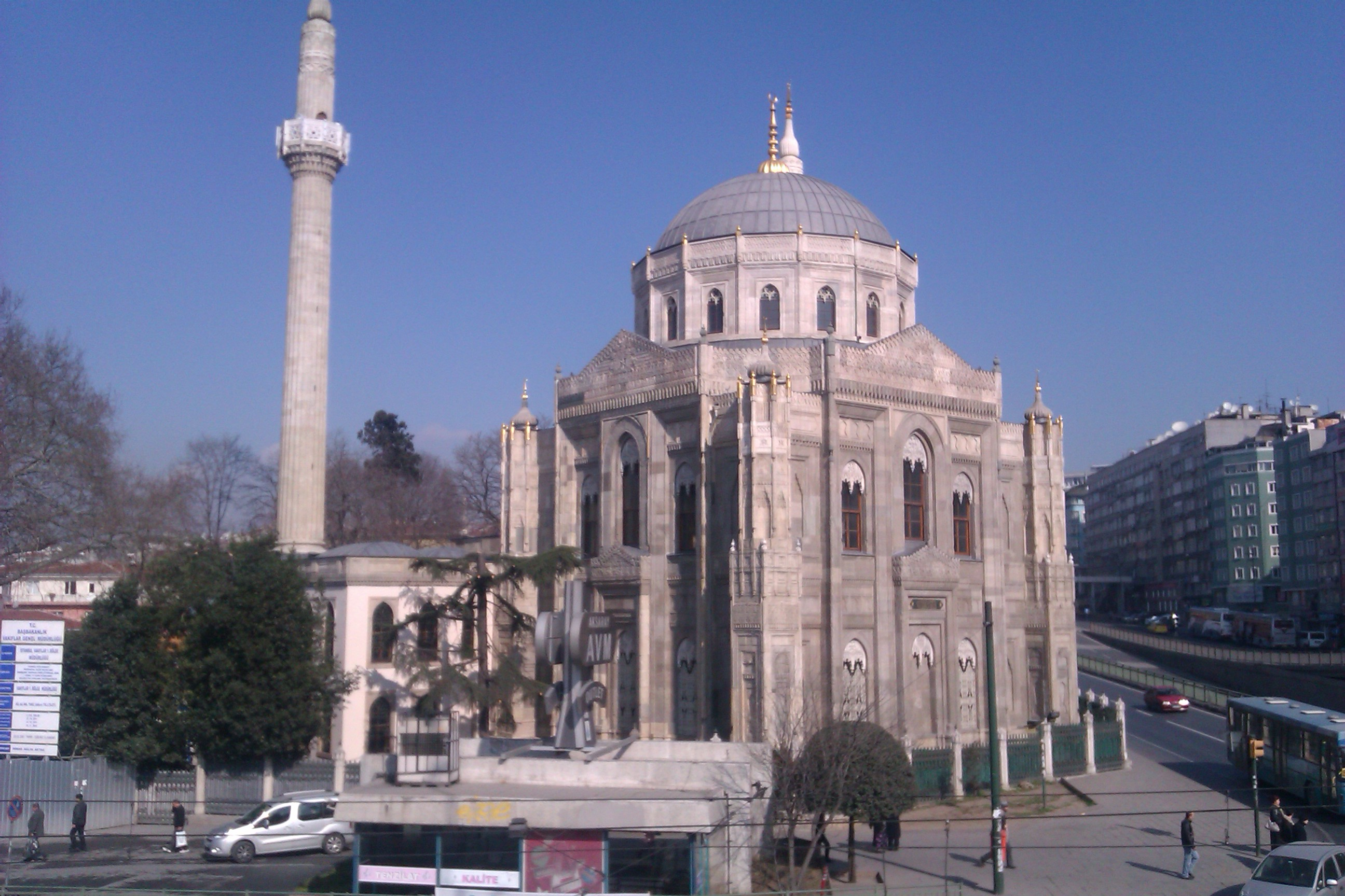 Pertevniyal Valide Sultan Mosque 1